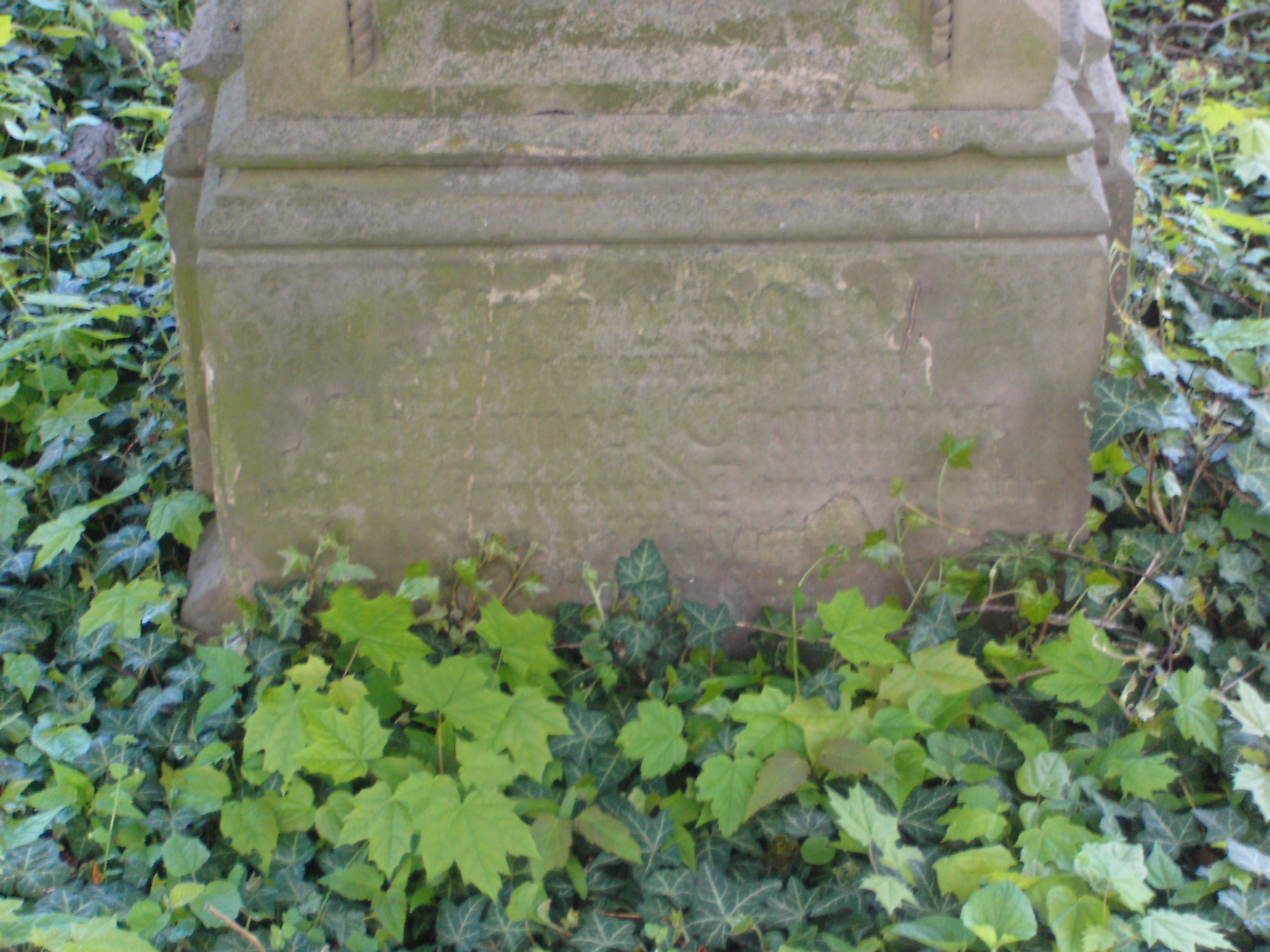 Grabsteininschrift Domkapitular Johannes Cronauer, Speyer